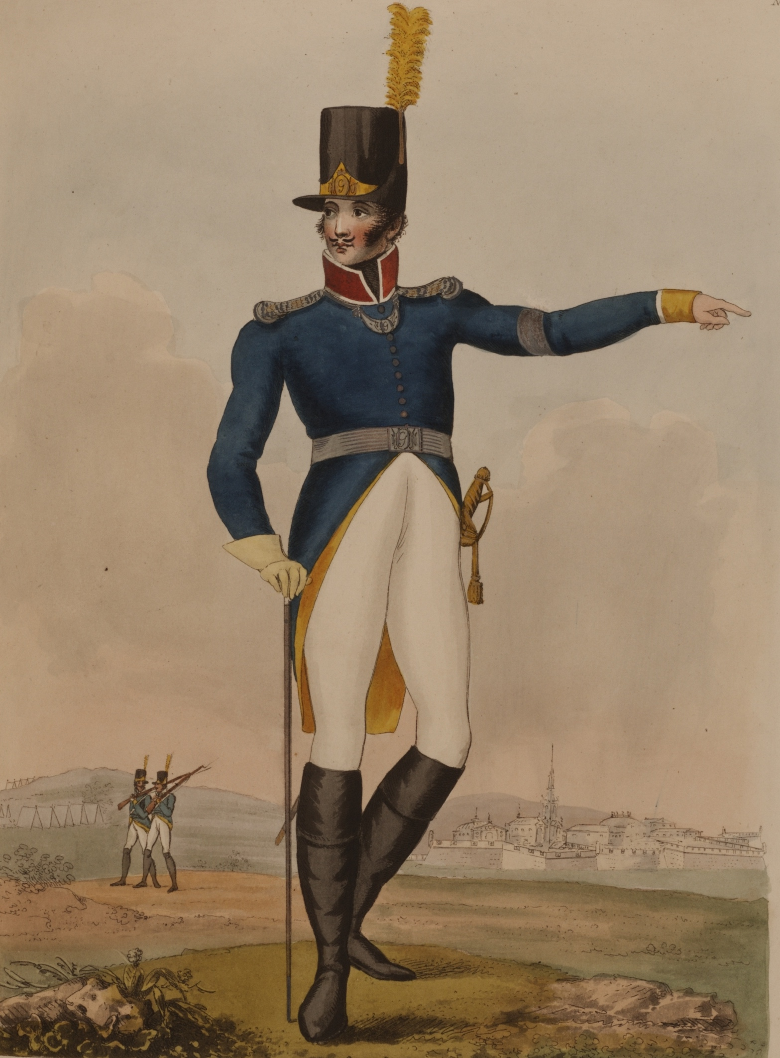 Uniform för Konungens eget värv adr regemente för en officer 1808.